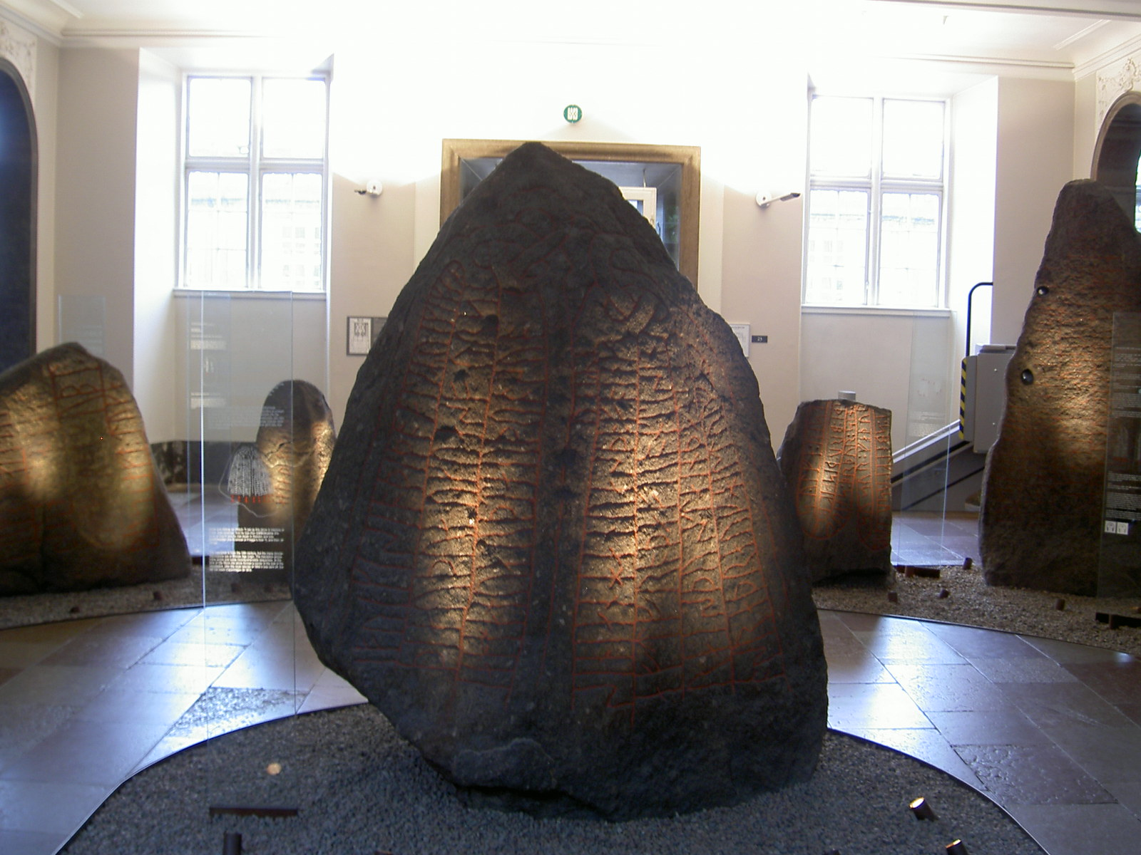 Kopenhagen, National Museum